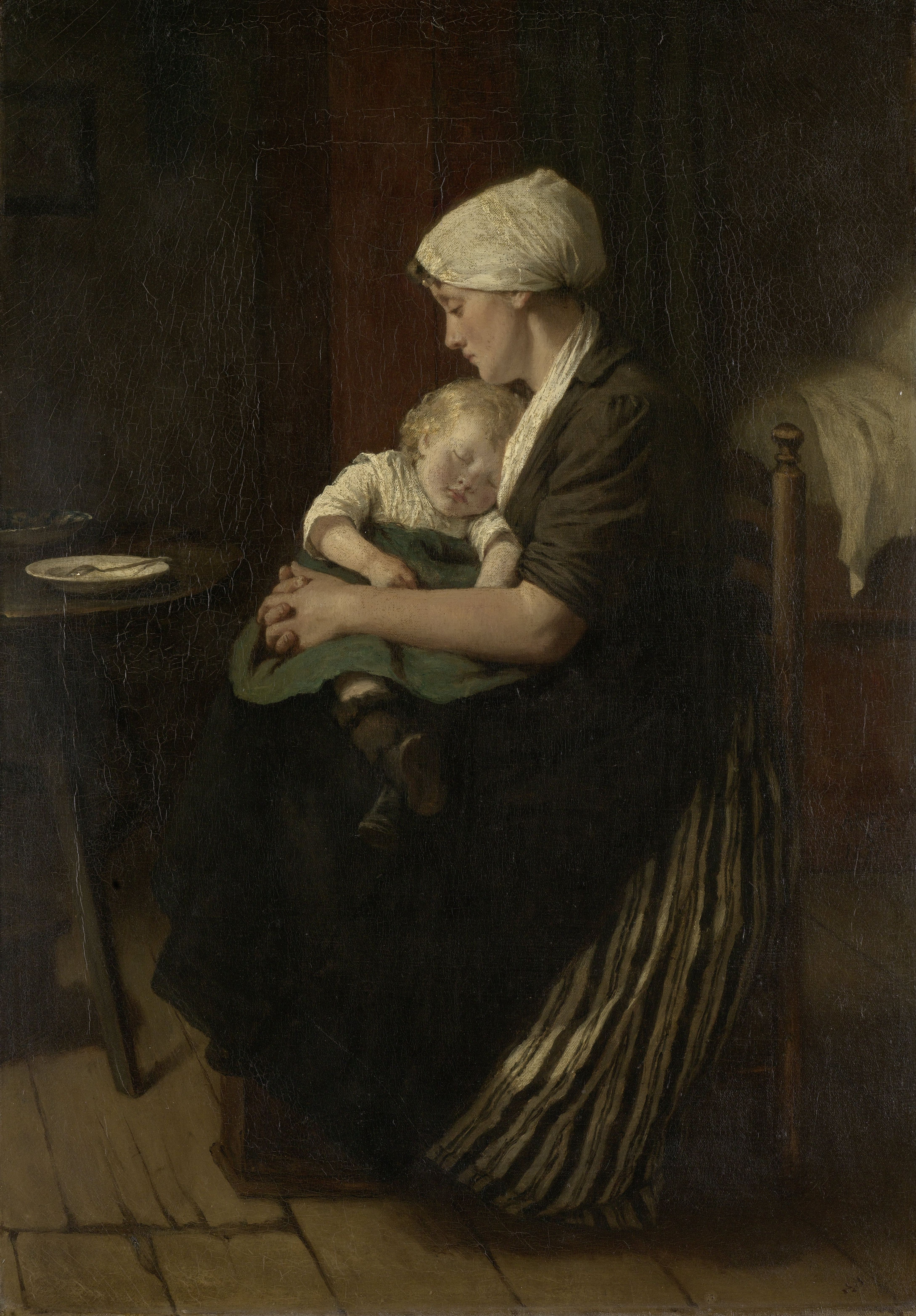 'In slaap gesust'. Zittende moeder met een slapend kind op schoot.